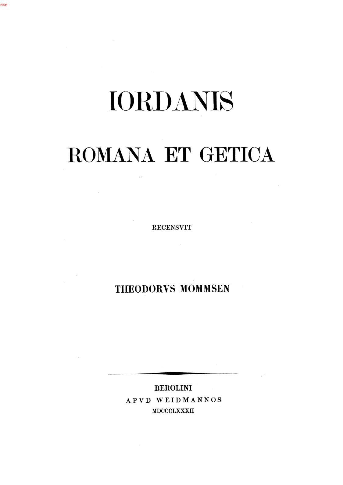 Iordanis Romana et Getica, ed. Th. Mommsen, Berlin 1882 (Monumenta Germaniae Historica. Auctores Antiquissimi 5,1) - Titelblatt.